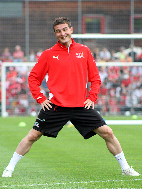 Alex Frei im Trainingslager der Schweizer Fussballnationalmannschaft vor der Euro 2008